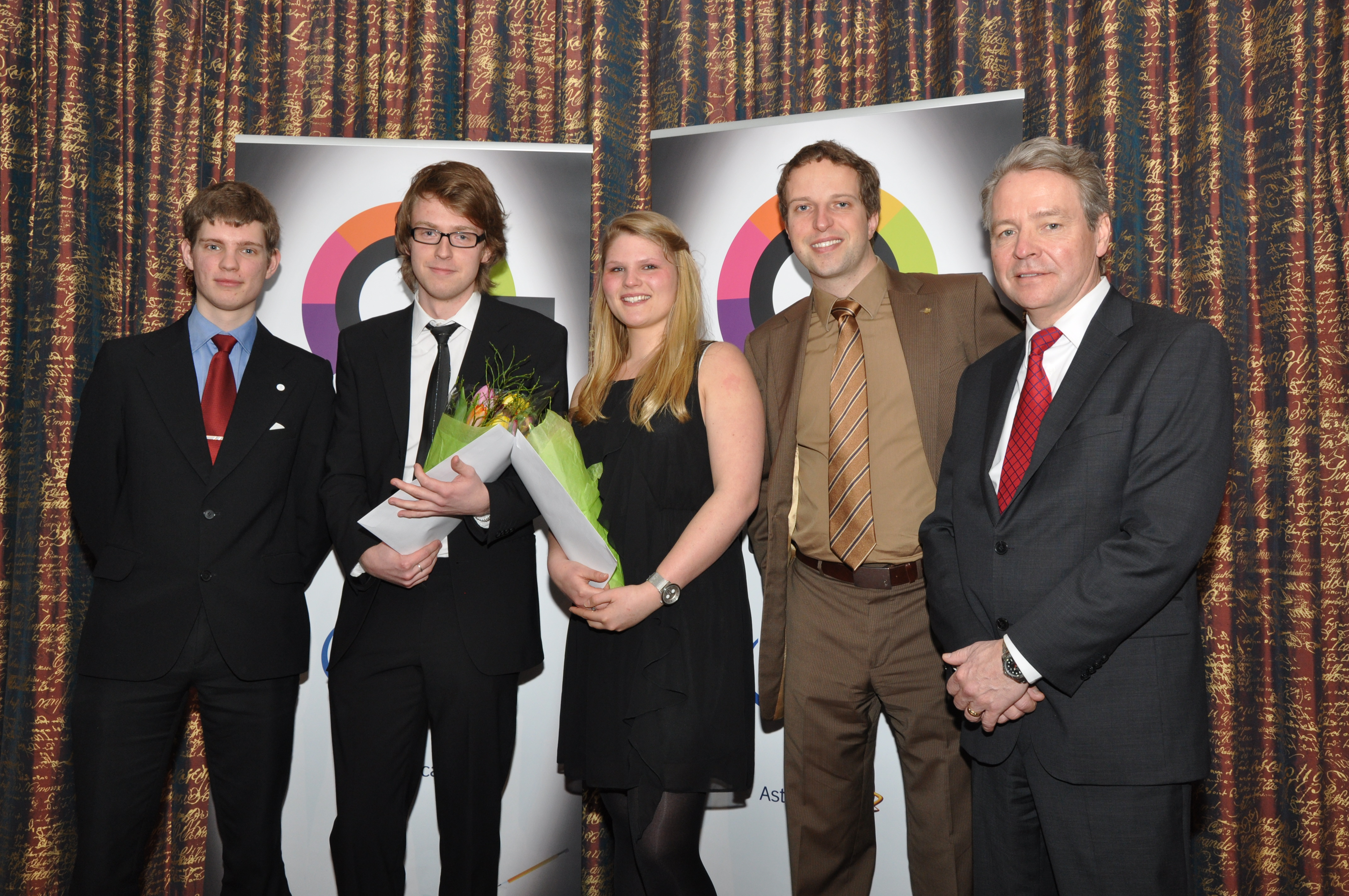 Utdelninga v priser i tävlingen "Utsällningen Unga Forskare", på Kungliga Vetenskapsakademin, 7:e april 2011 Robert Piehl-Fridqvist, Daniel Nordqvist, Sanne Johansson, Michal Dzoga, Carl-Daniel Norenberg. Intels representanter med vinnarna av Intel International Science and Engineering Fair